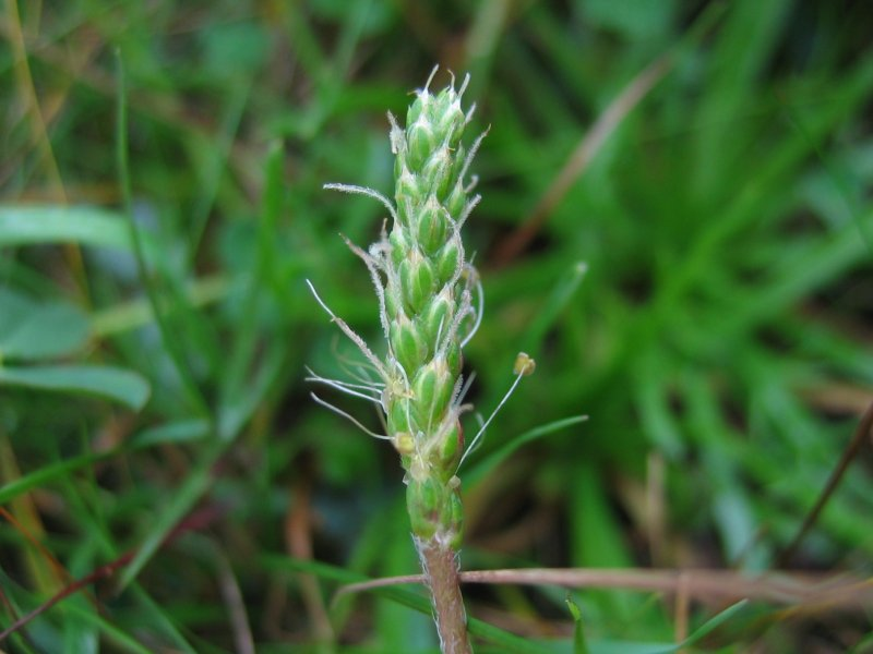 Krähenfuß-Wegereich Plantago coronopus, Blütenähre, Wismarbucht